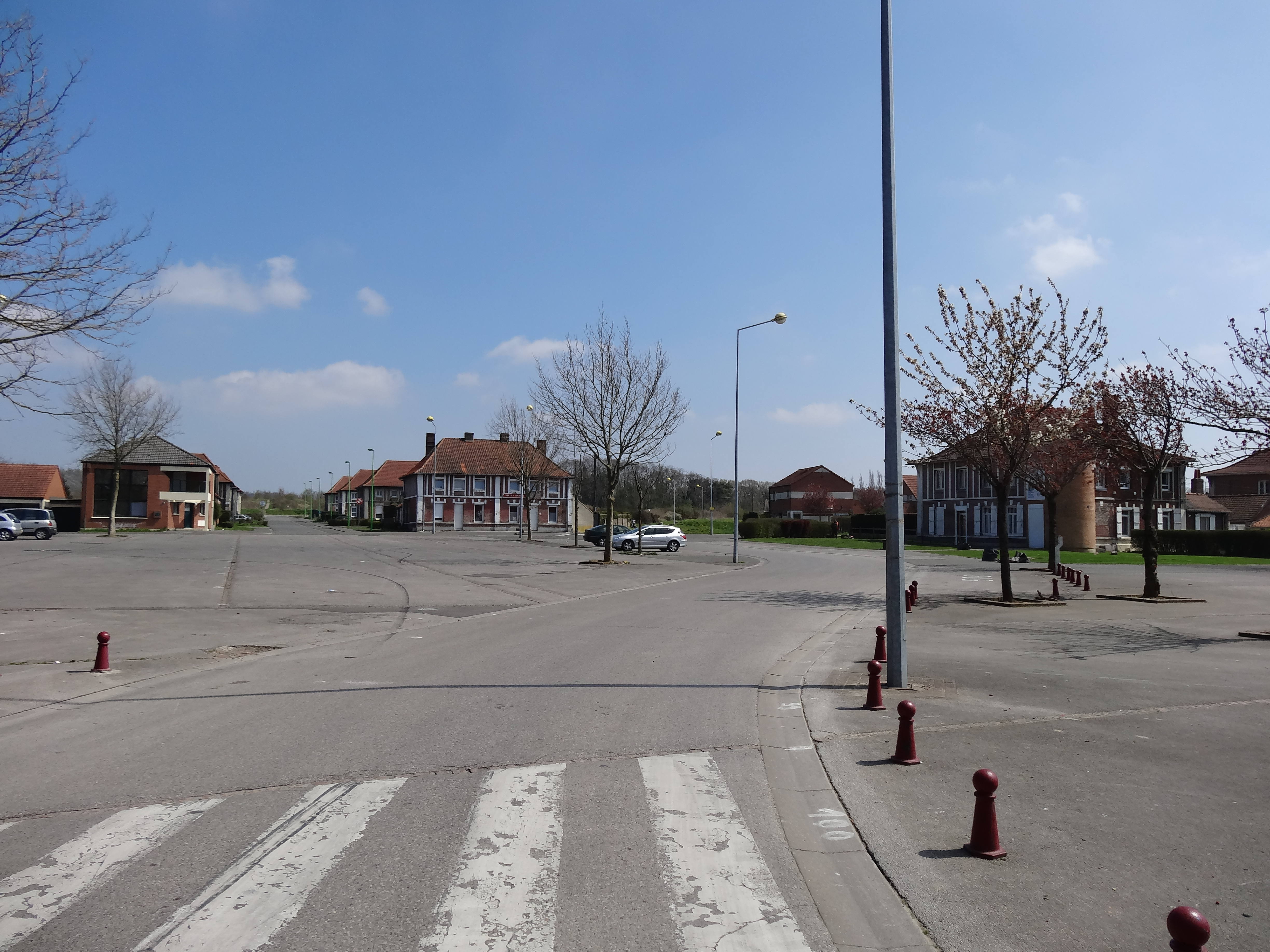 Église Sainte-Barbe, détruite en 1981, de la cité des Brebis de la fosse n° 6 - 6 bis de la Compagnie des mines de Béthune dans le bassin minier du Nord-Pas-de-Calais, Bully-les-Mines, Pas-de-Calais, Nord-Pas-de-Calais, France.